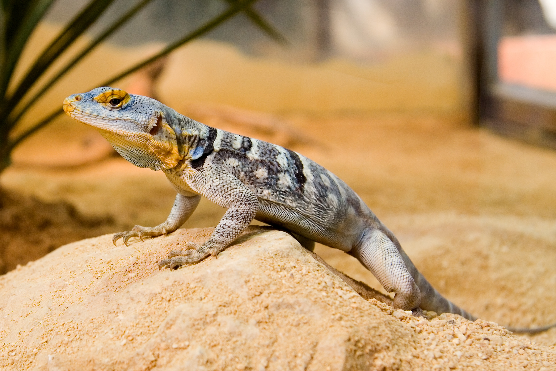 Blauer Felsenleguan (Petrosaurus thalassinus) im Frankfurter Zoo